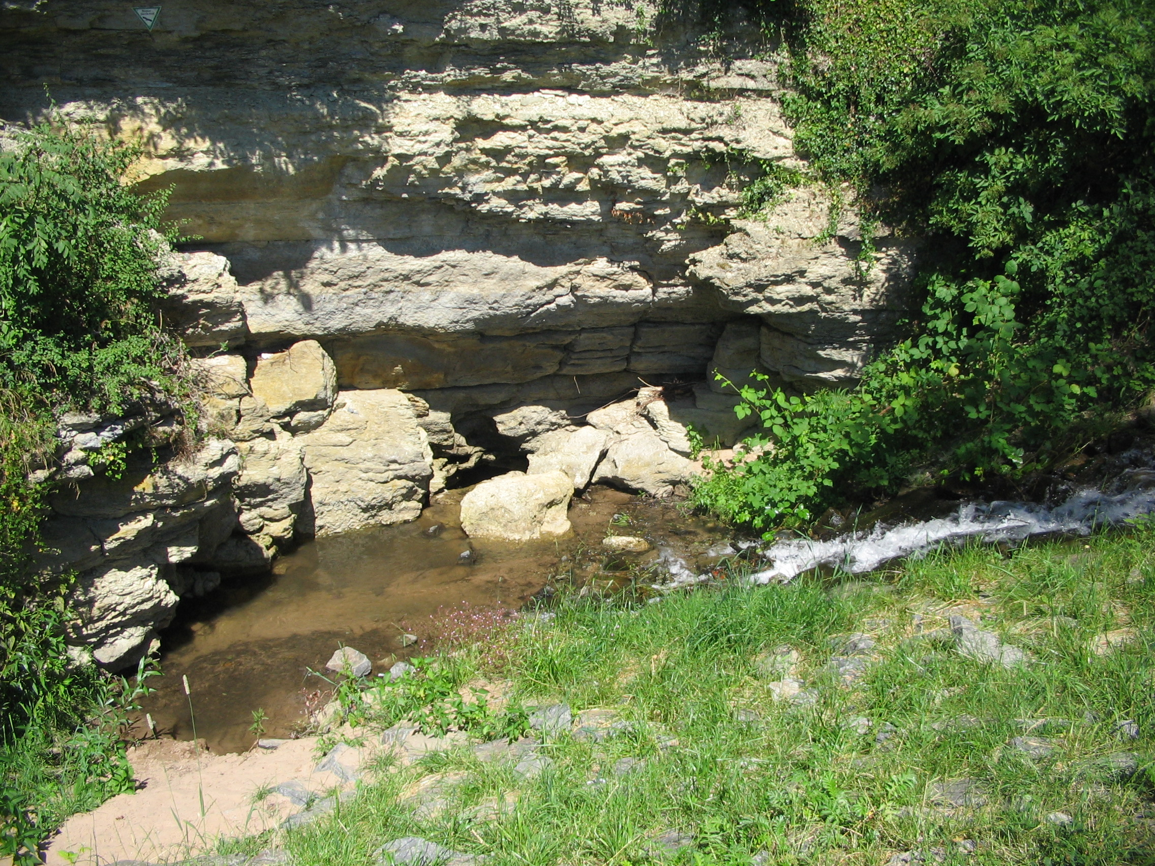 Dritte und bei normaler Wasserführung letzte der fünf Versickerungsstellen des Erdbachs in Dorf-Erbach mit Karstwand